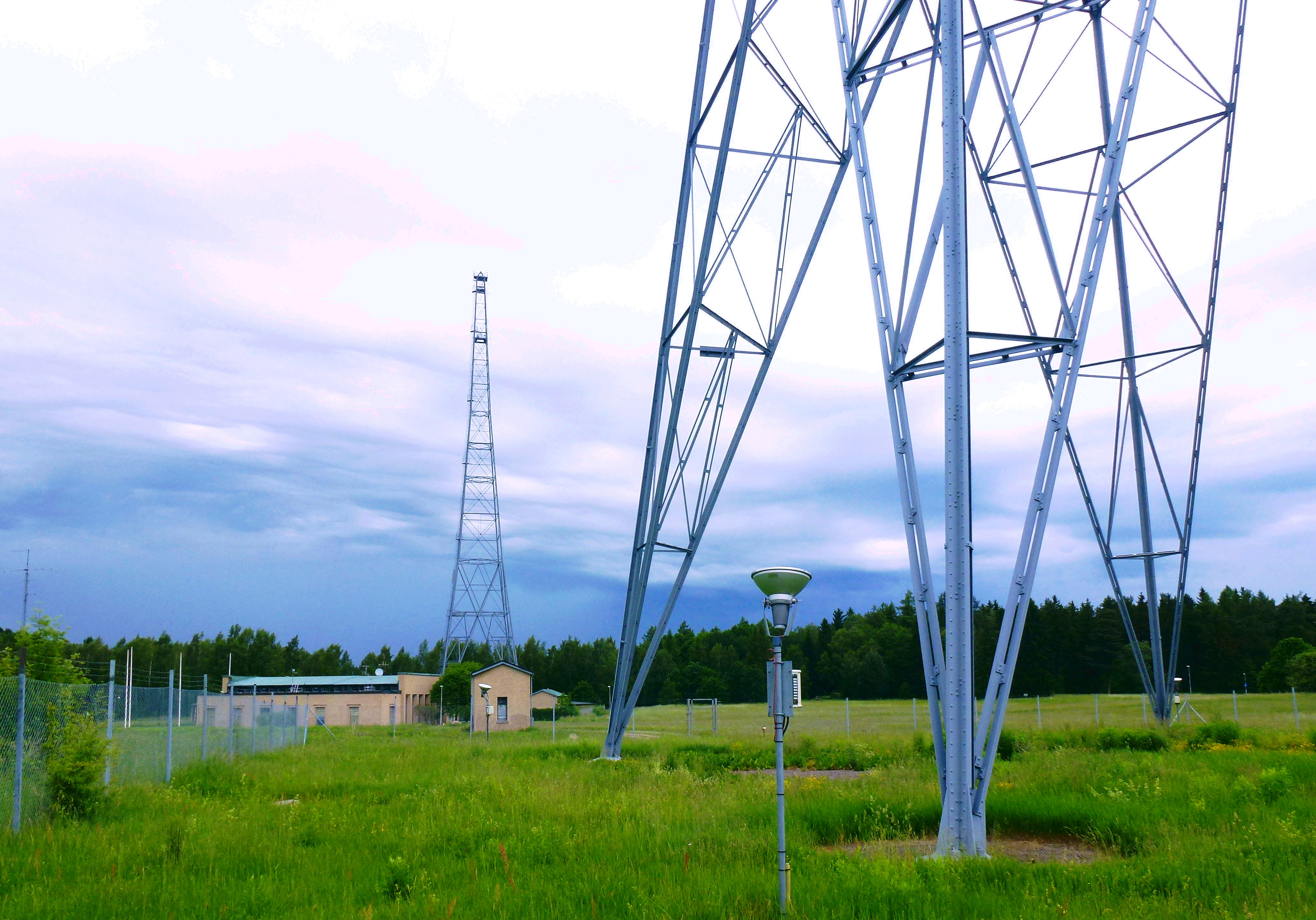 Motala Rundradiomuseum, radiomasterna